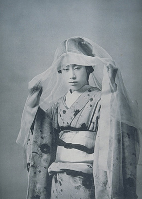 Kiyoka of Shimbashi, Tokyo. Photographer: Kazumasa Ogawa, 1902.